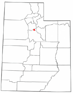 Localización de Alpine, Utah